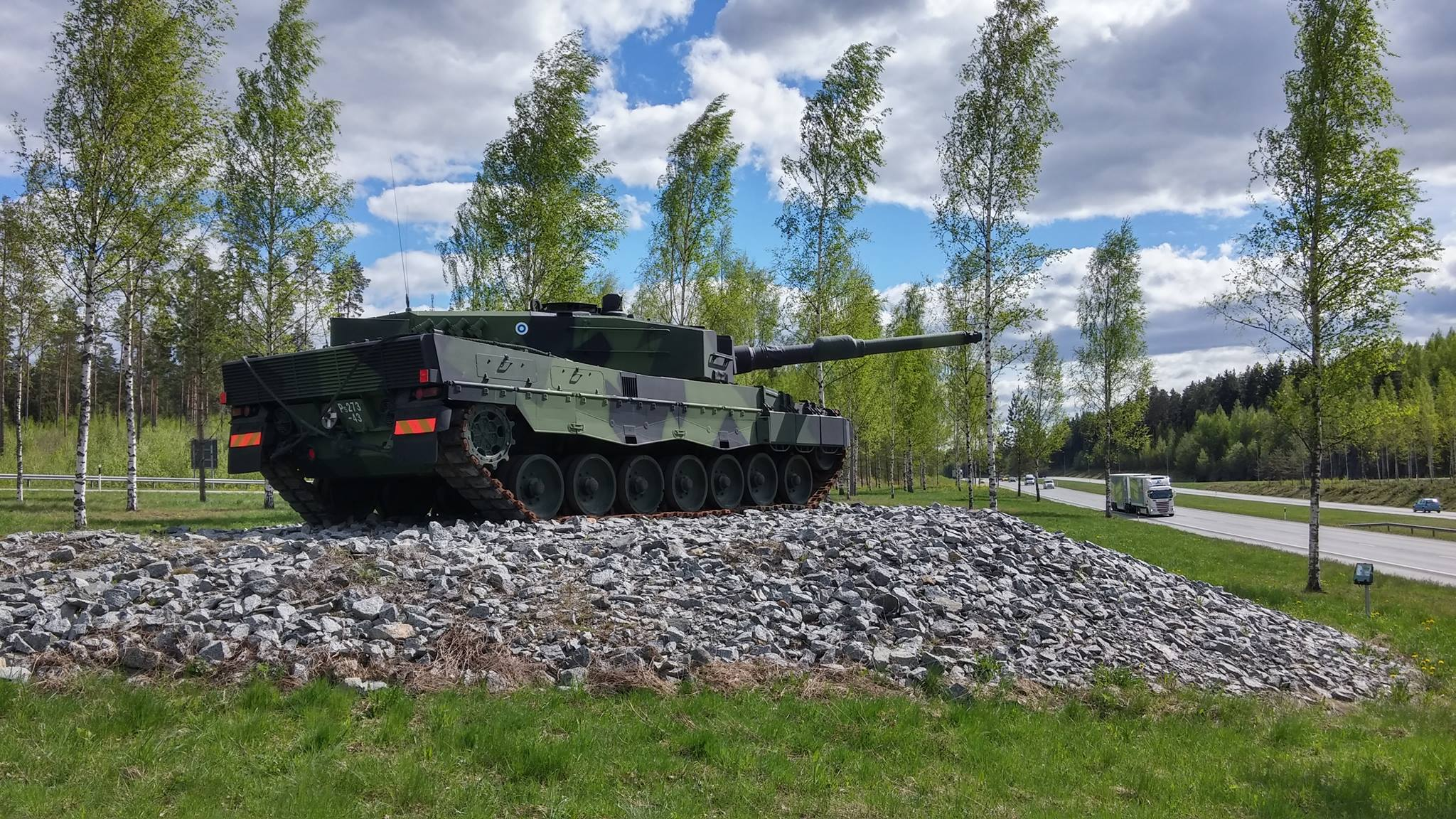 Valtatie 3:n liittymässä Hattulaan voi bongata kaksi panssaria: sodanaikaisen rynnäkkövaunun sekä tämän Leopard 2 A 4:n.